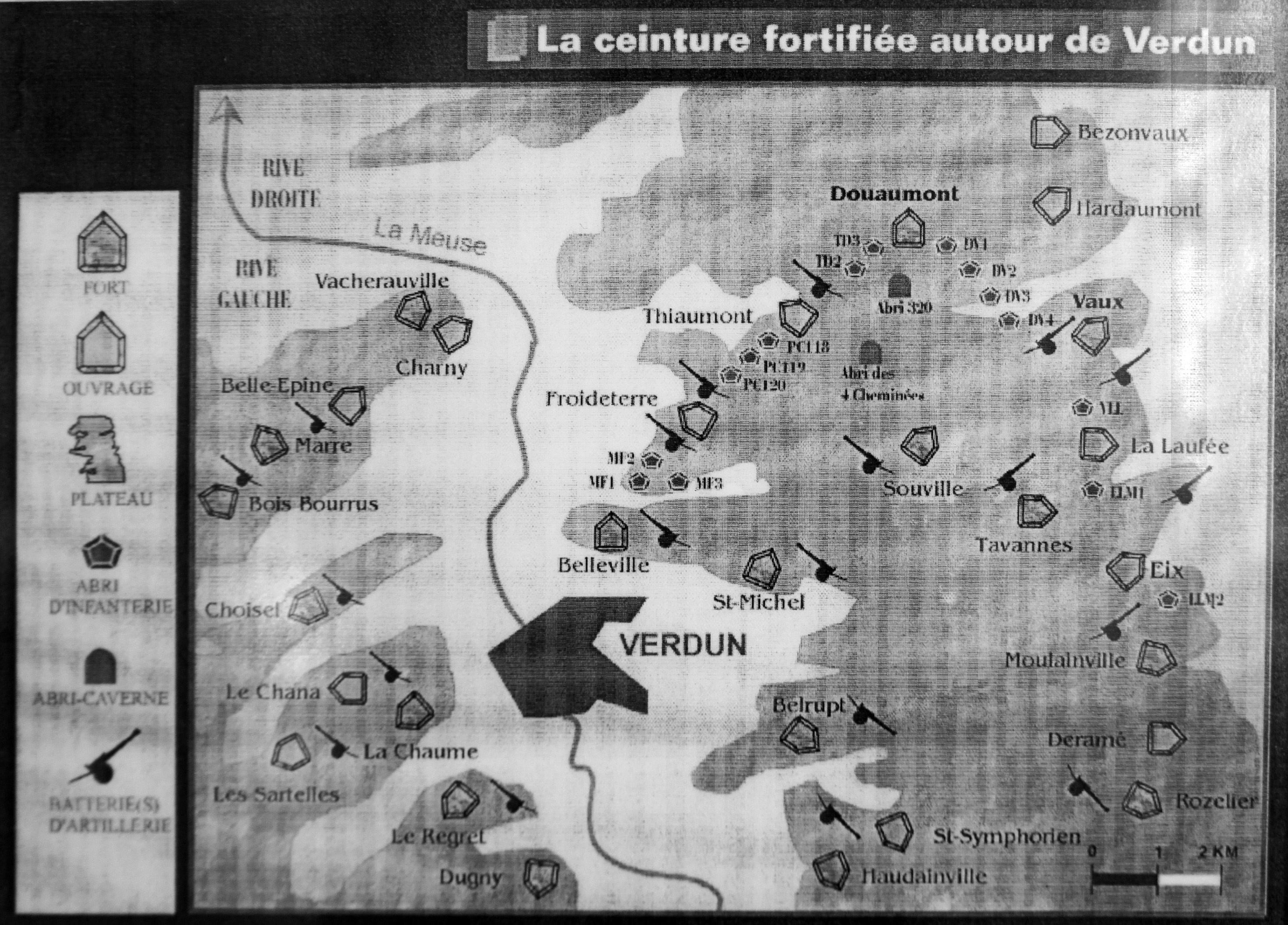 Carte de Verdun. Avec l'aide des Amis du musée EMile Driant .